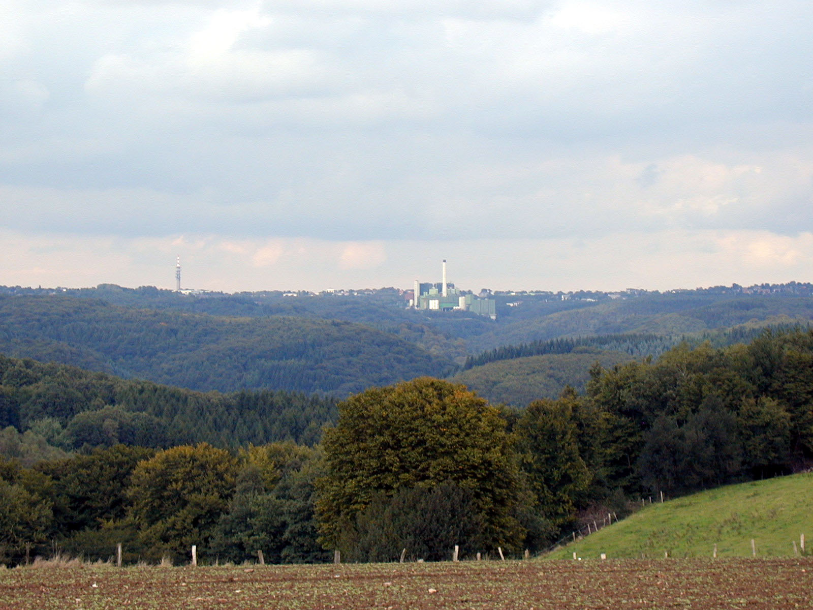 Blick über das Tal der Wupper auf den Staatsforst Burgholz (Wuppertal)